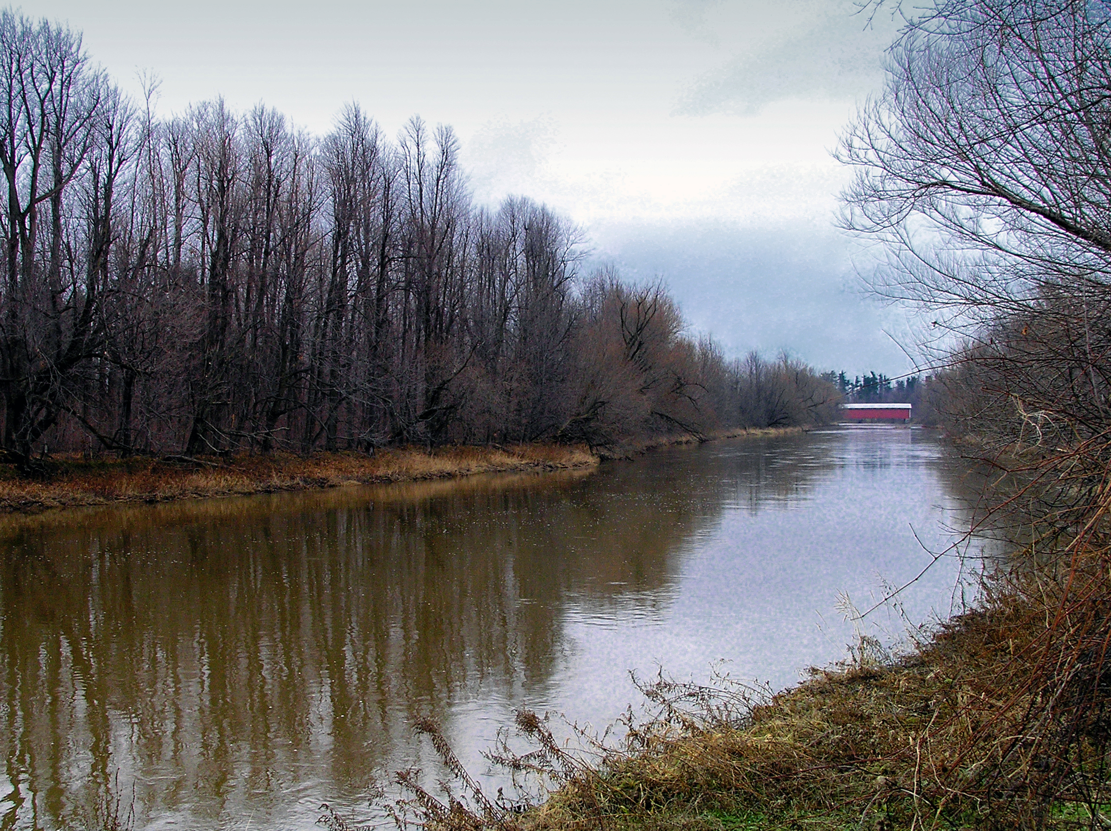 Notre-Dame-de--Stanbridge (Québec) - Le Pont des Rivières sur la Rivière aux Brochets